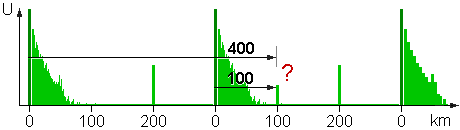 Echosignale aus Überreichweiten werden in der falschen PRT empfangen und sind somit mehrdeutig.